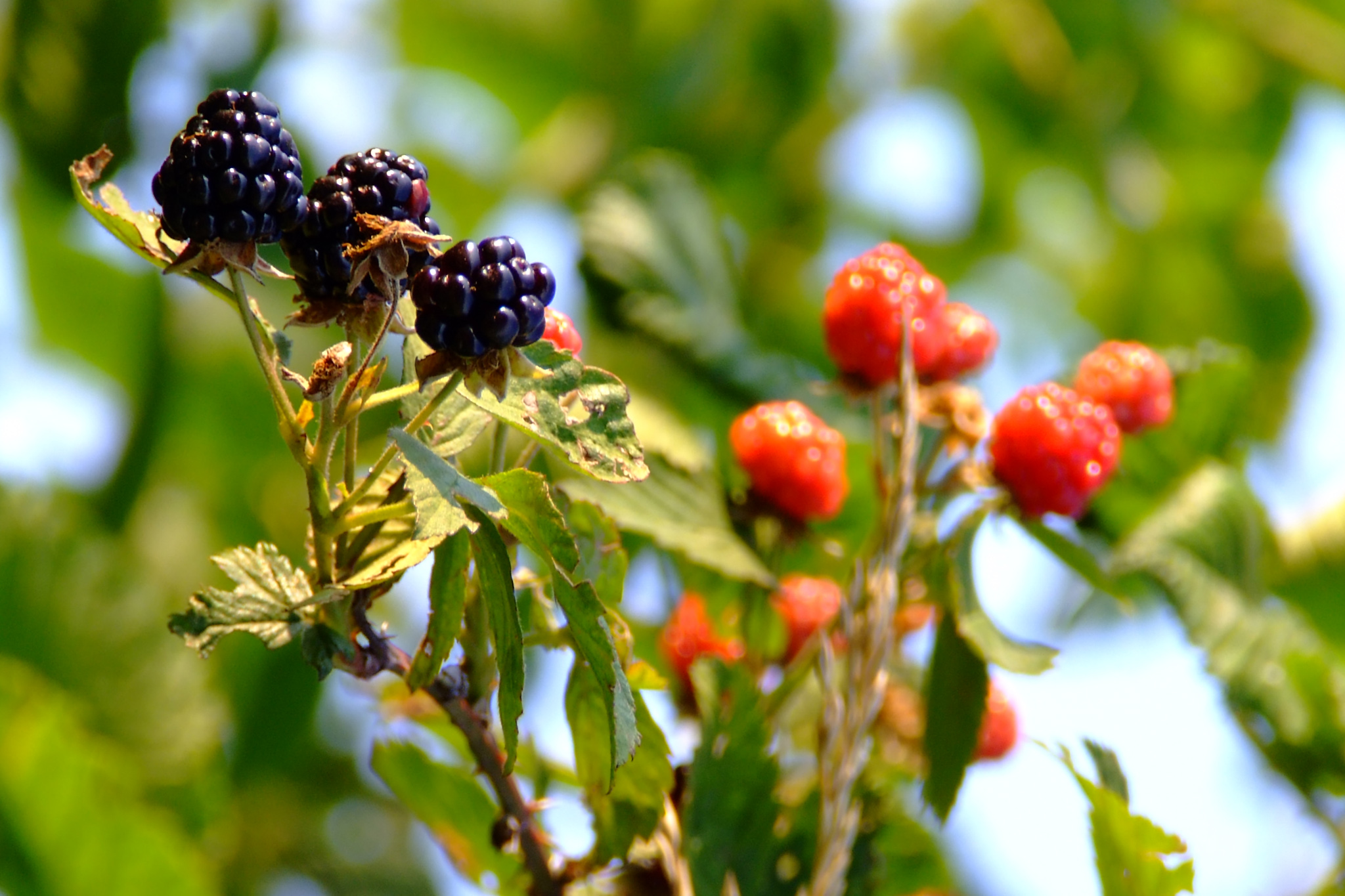 Blackberries